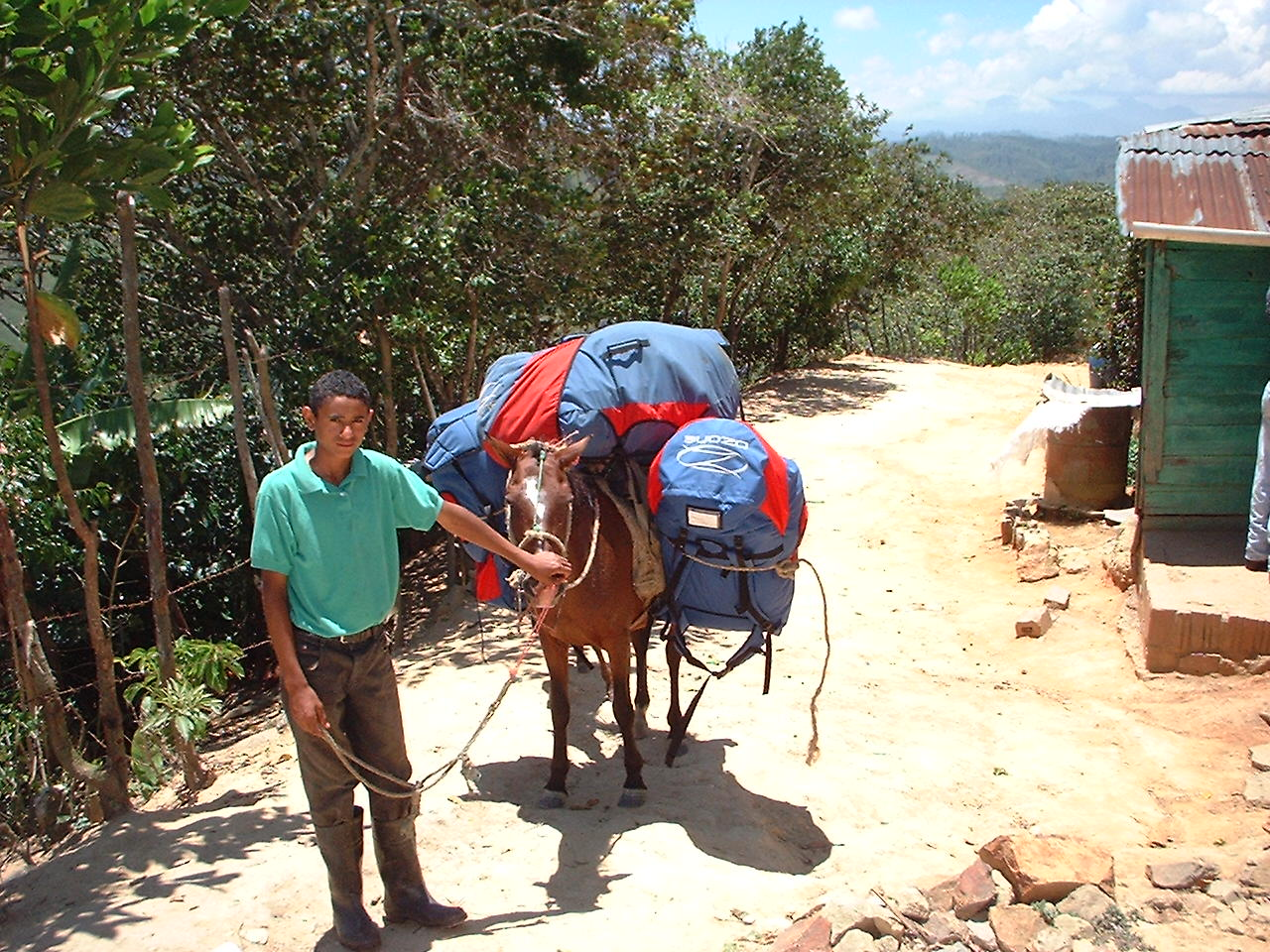 Paragliding, Jarabacoa